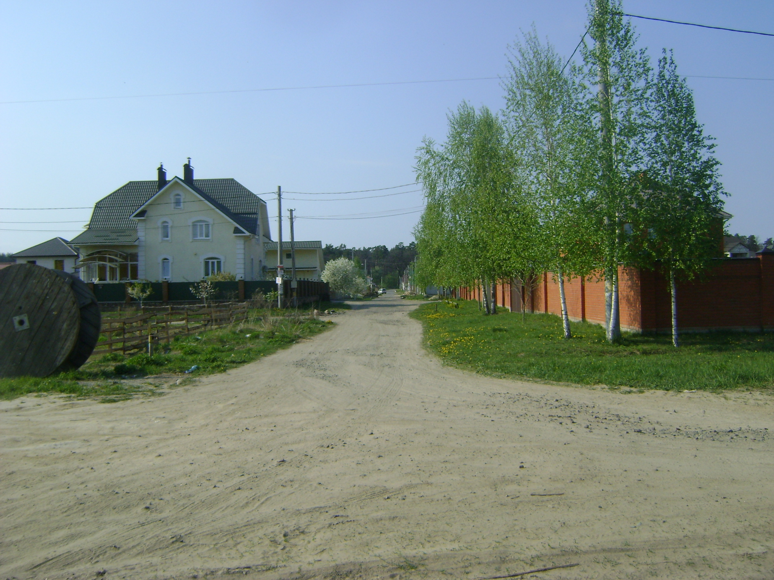 Вулиця Гамалія Дмитра у Броварах. Названа на честь Дмитра Гамалія.